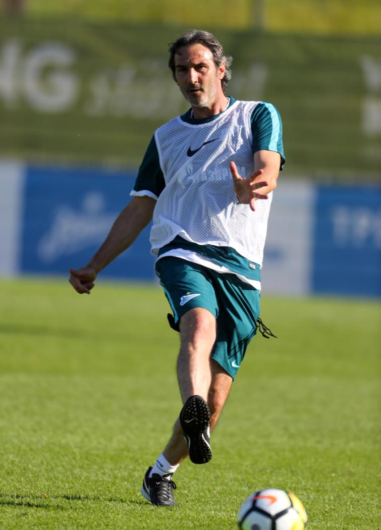 19.06.2017. Австрия, Гойнг-ам-Вильден-Кайзер. «Газпром»-тренировочные сборы в Австрии: вечерняя тренировка.